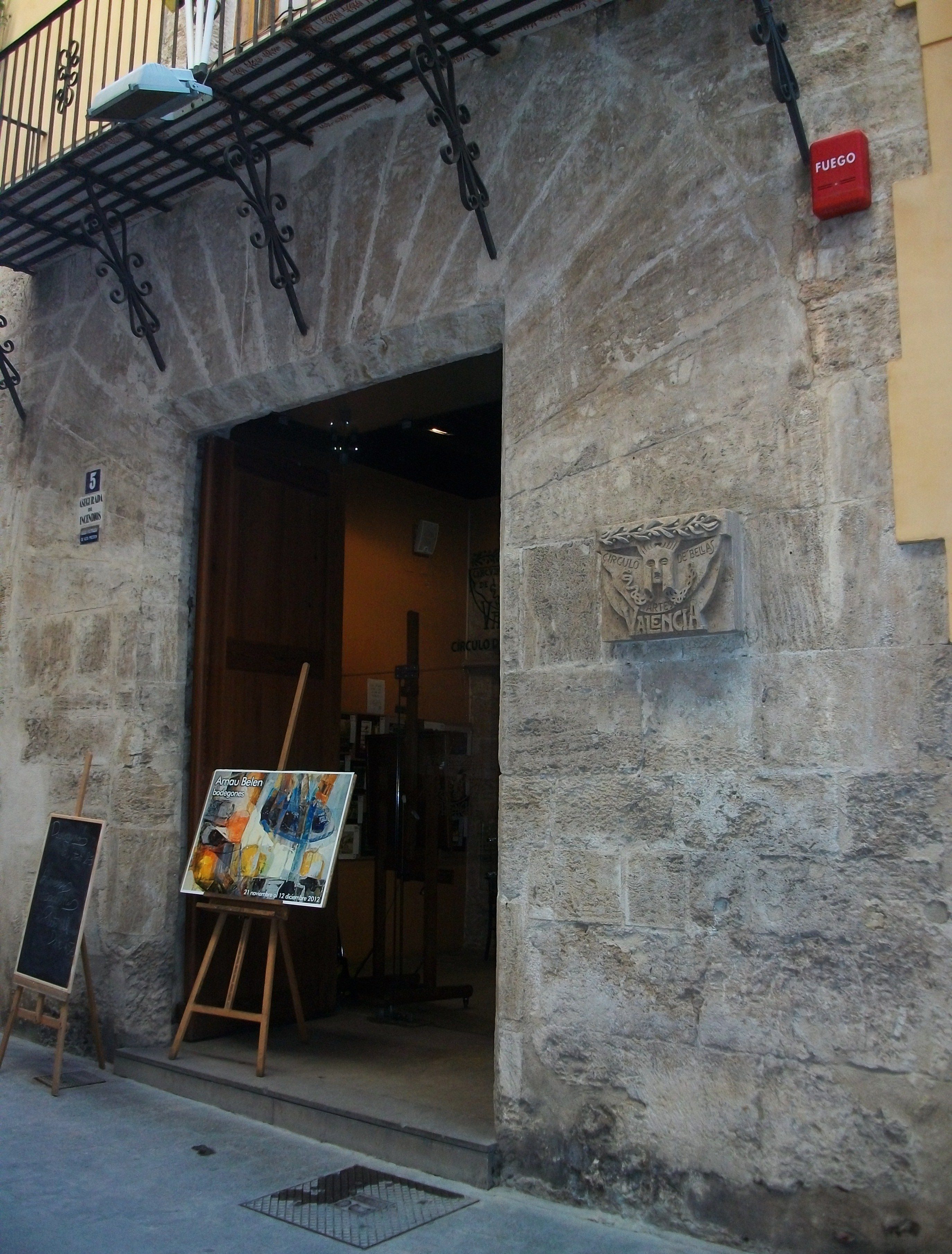 Cercle de Belles Arts de València.